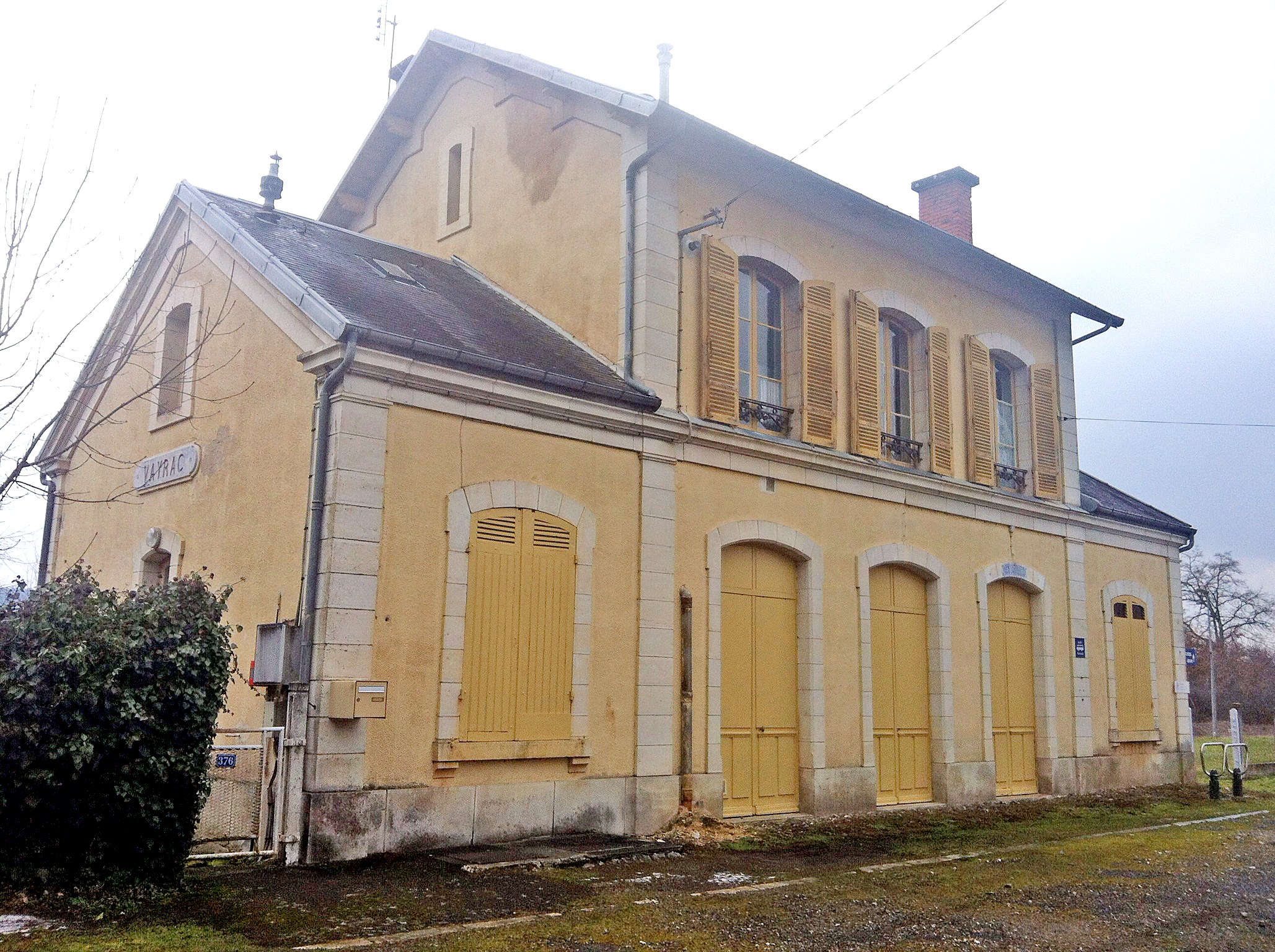 Vue EST de la Gare de Vayrac en direction de Brive La Gaillarde